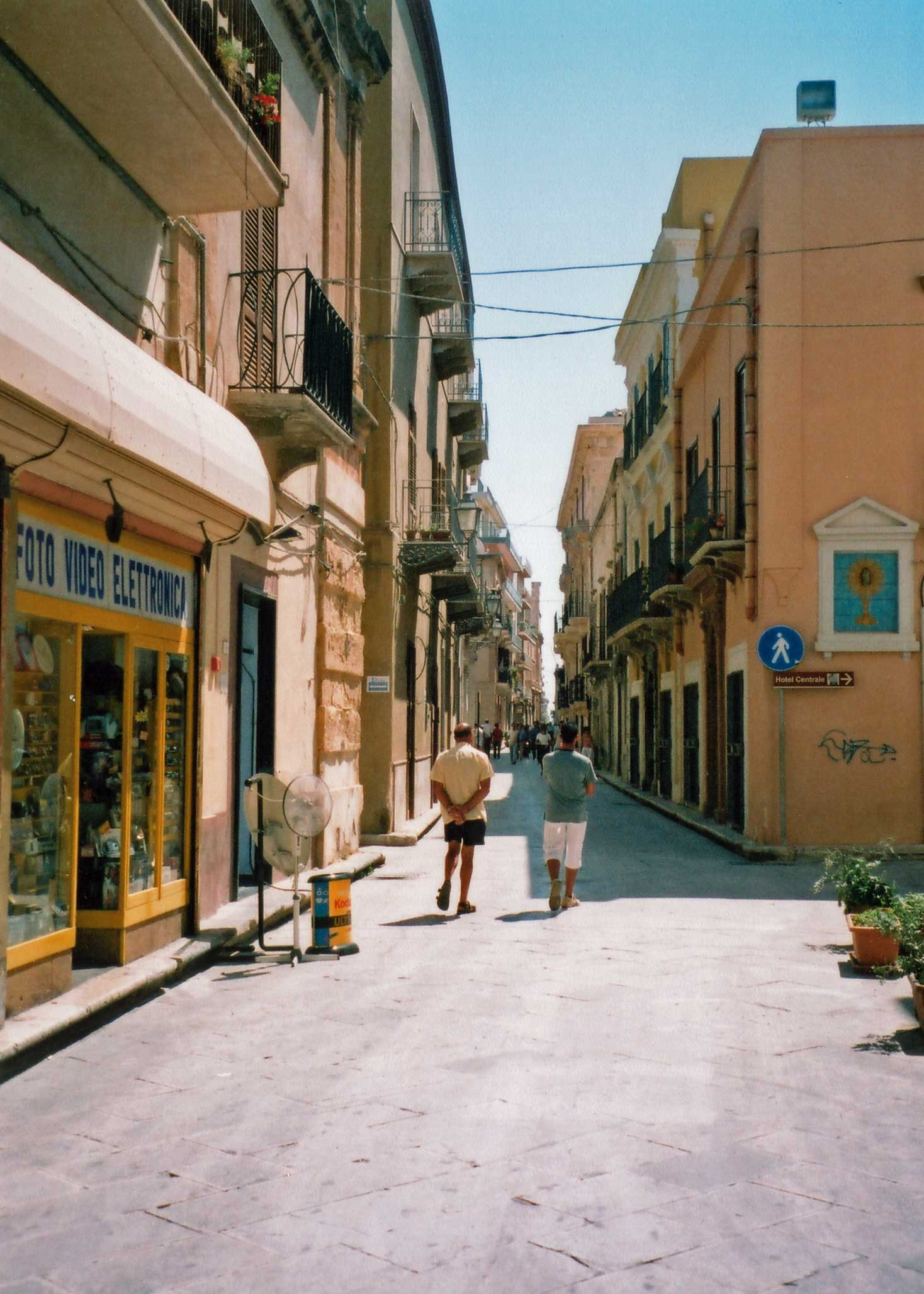 Marsala, Sicilia, Italia